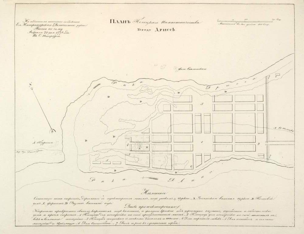 Беларуская (тарашкевіца): Дрыса (Drysa). Плян места, праект